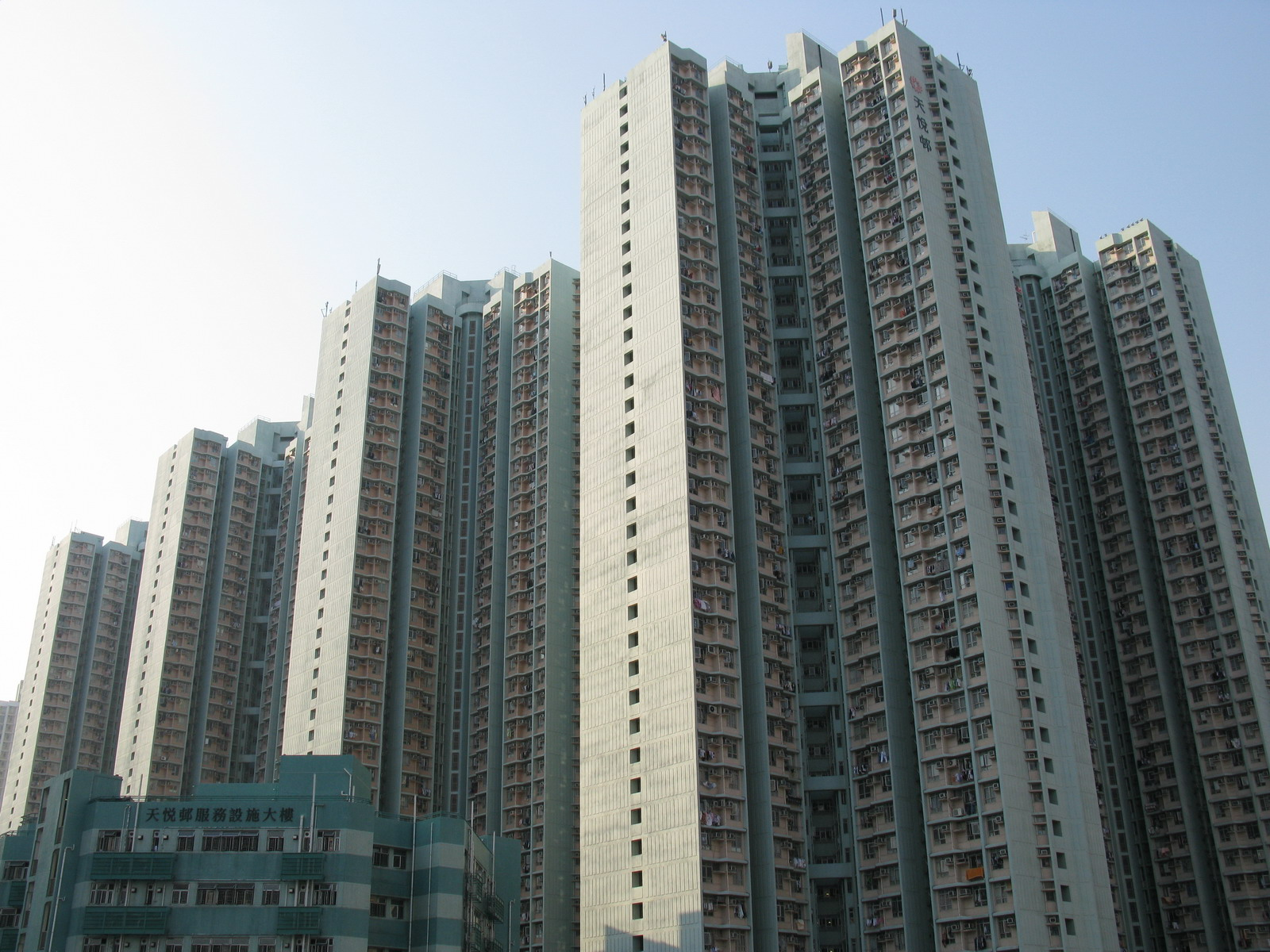 天悅邨 Tin Yuet Estate